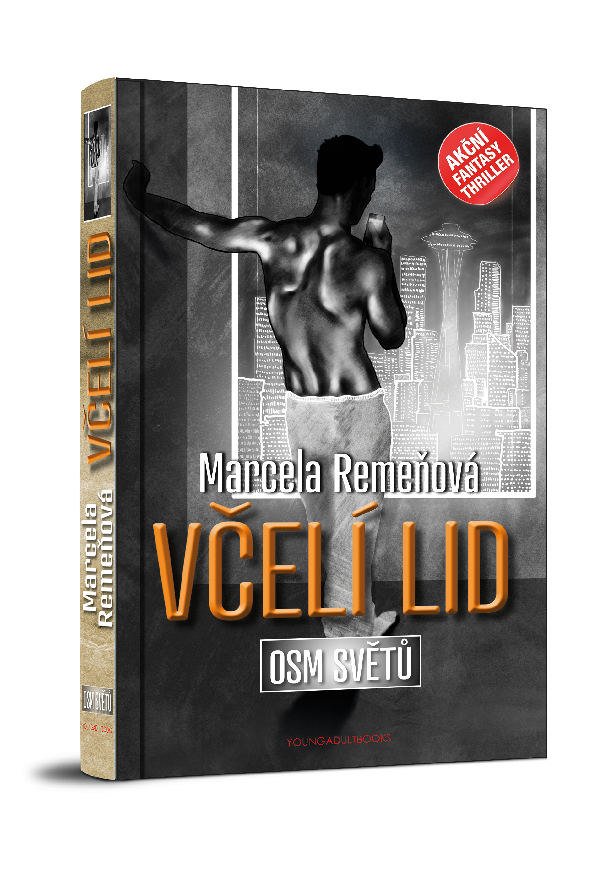 Osm světů - Vceli lid - obal 2.díl